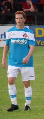 YCFC vs SAFC